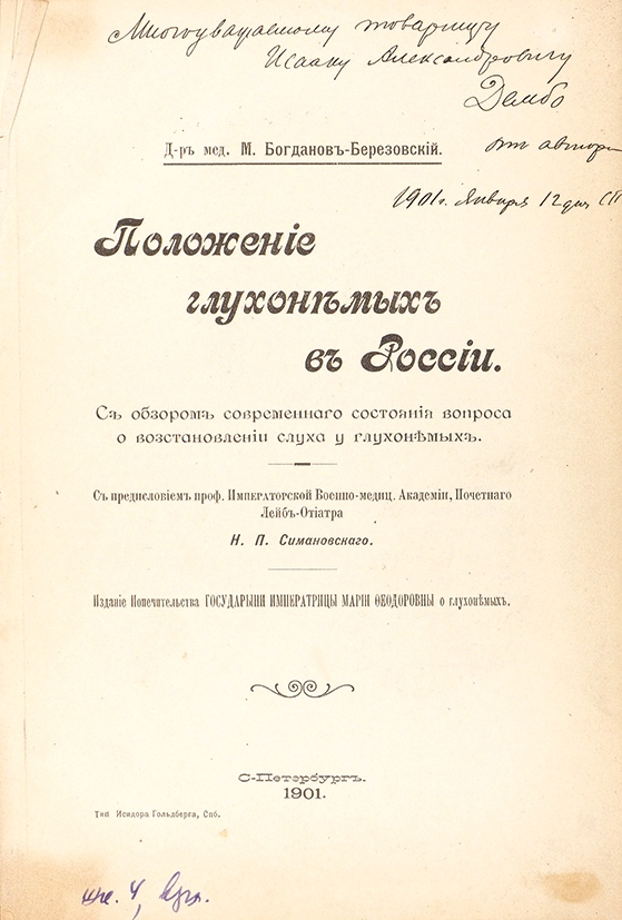 Богданов-Березовский, М. Положение глухонемых в России. СПб.: В Тип. Исидора Гольдберга, 1901. XII, 292, [3] с.; 5 л. ил. 24,8 х 17,5 см. На титульном листе дарственная надпись: «Многоуважаемому товарищу / Исаку Александровичу / Дембо / от автора / 1901 г. января 12 дня СПб».